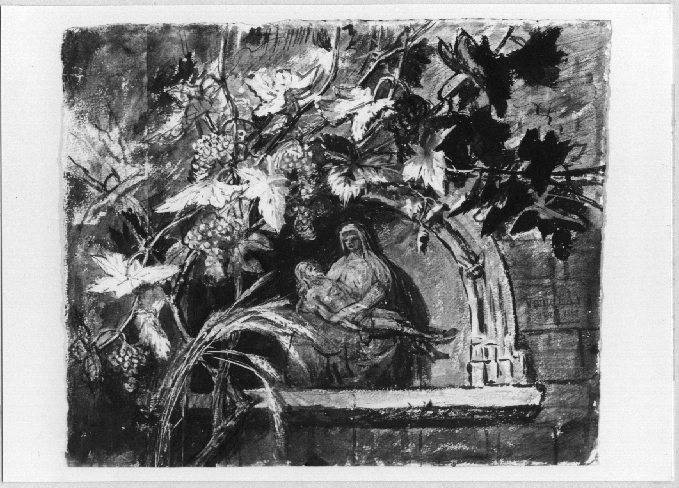 Image en noir et blanc d'un dessin ou esquisse nommée "Pietà sculptée dans une niche entourée d'une vigne et d'une gerbe d'avoine"